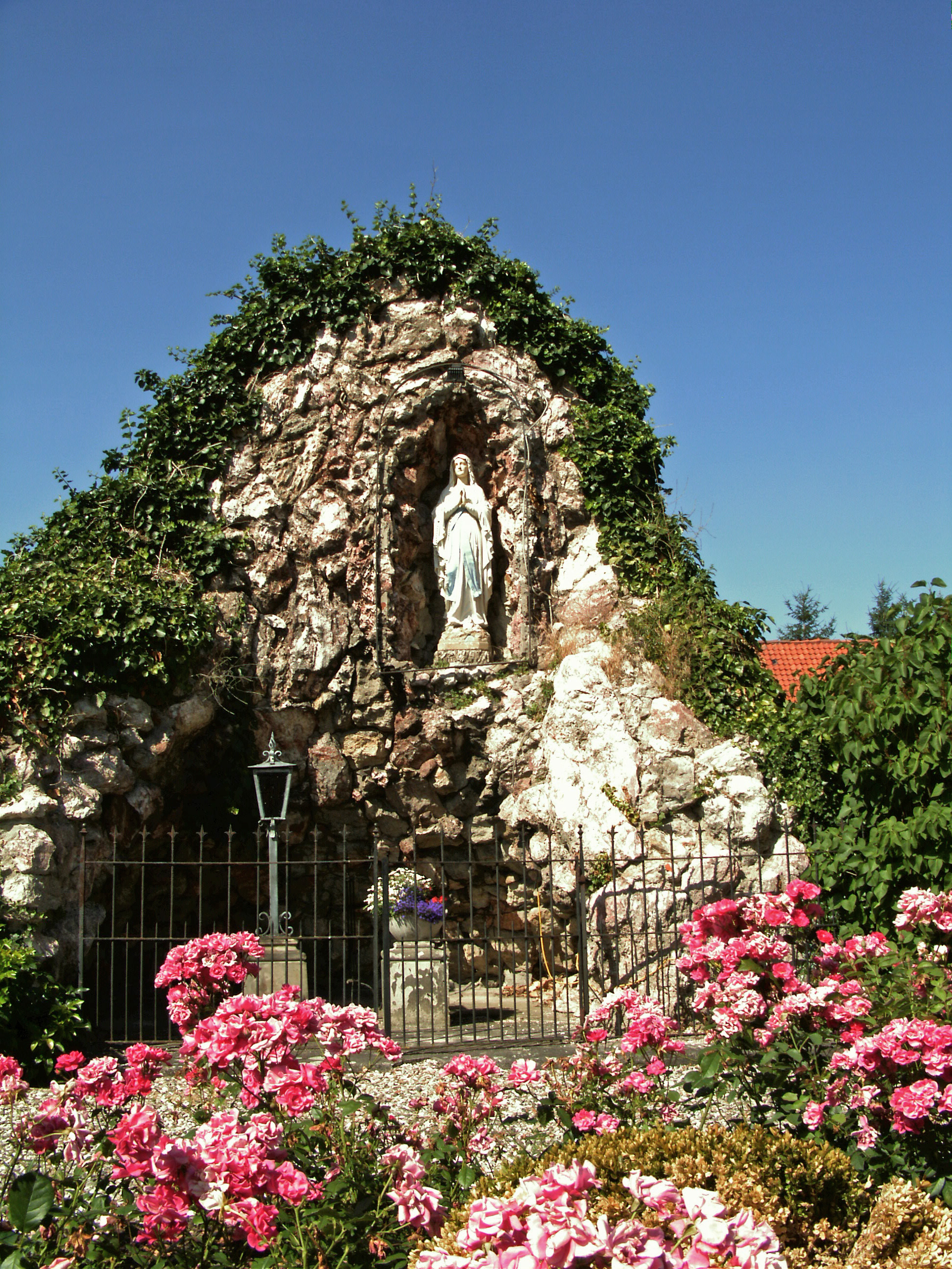 Mariengrotte an der kath. Kirche St. Cosmas und Damian in Wöhle, Ortsteil von Schellerten